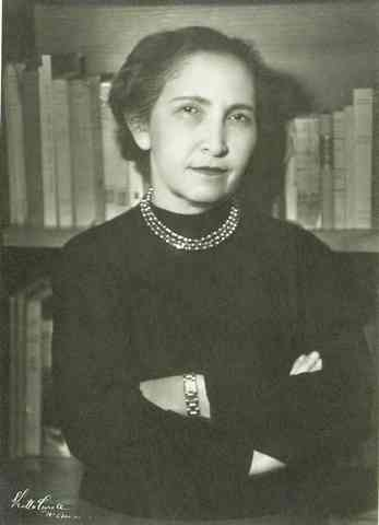 Tzippora Sharett